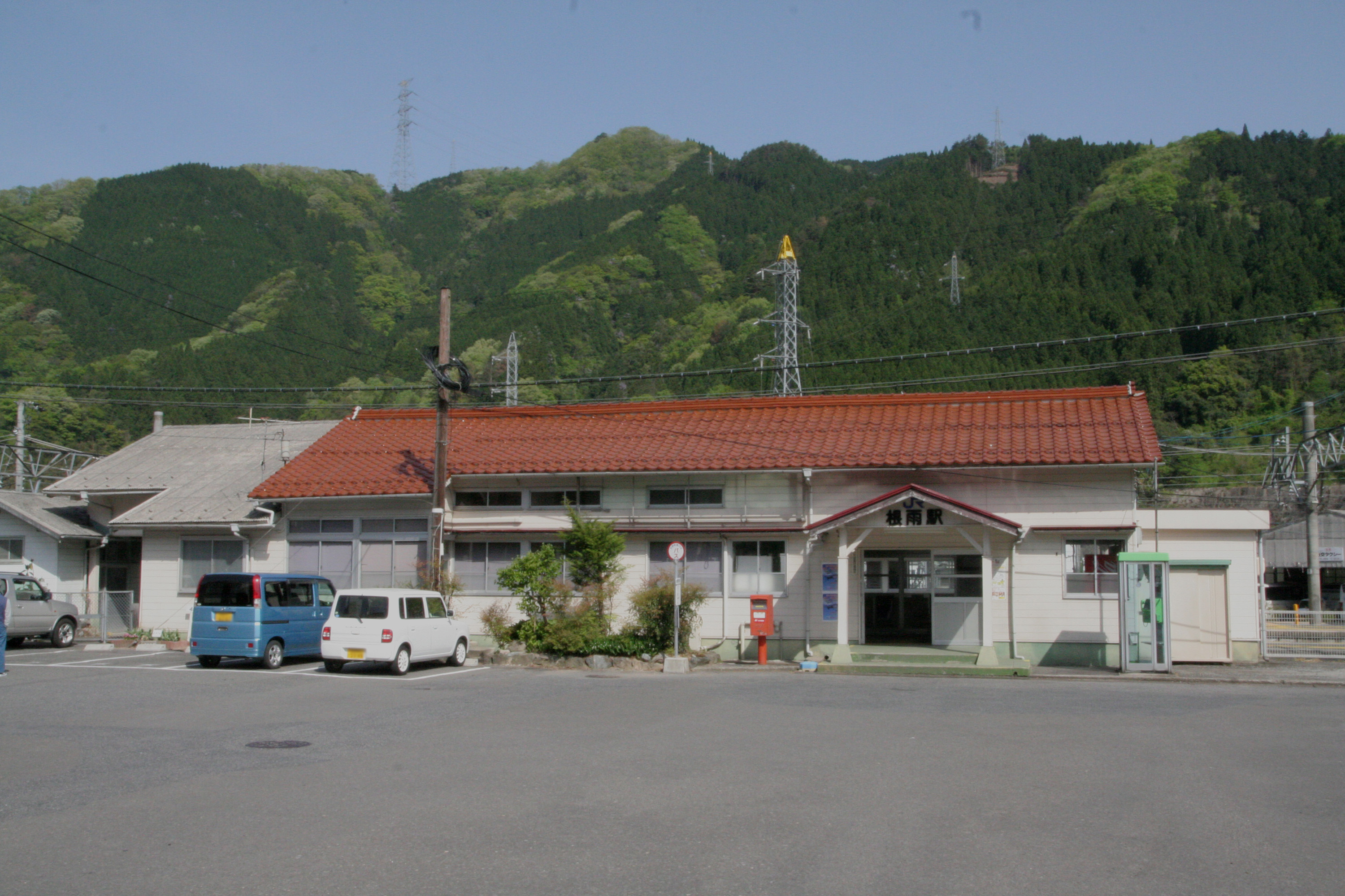 根雨駅の駅舎